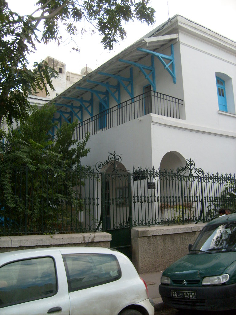 Siège de l'Union des écrivains tunisiens à Tunis (Tunisie)